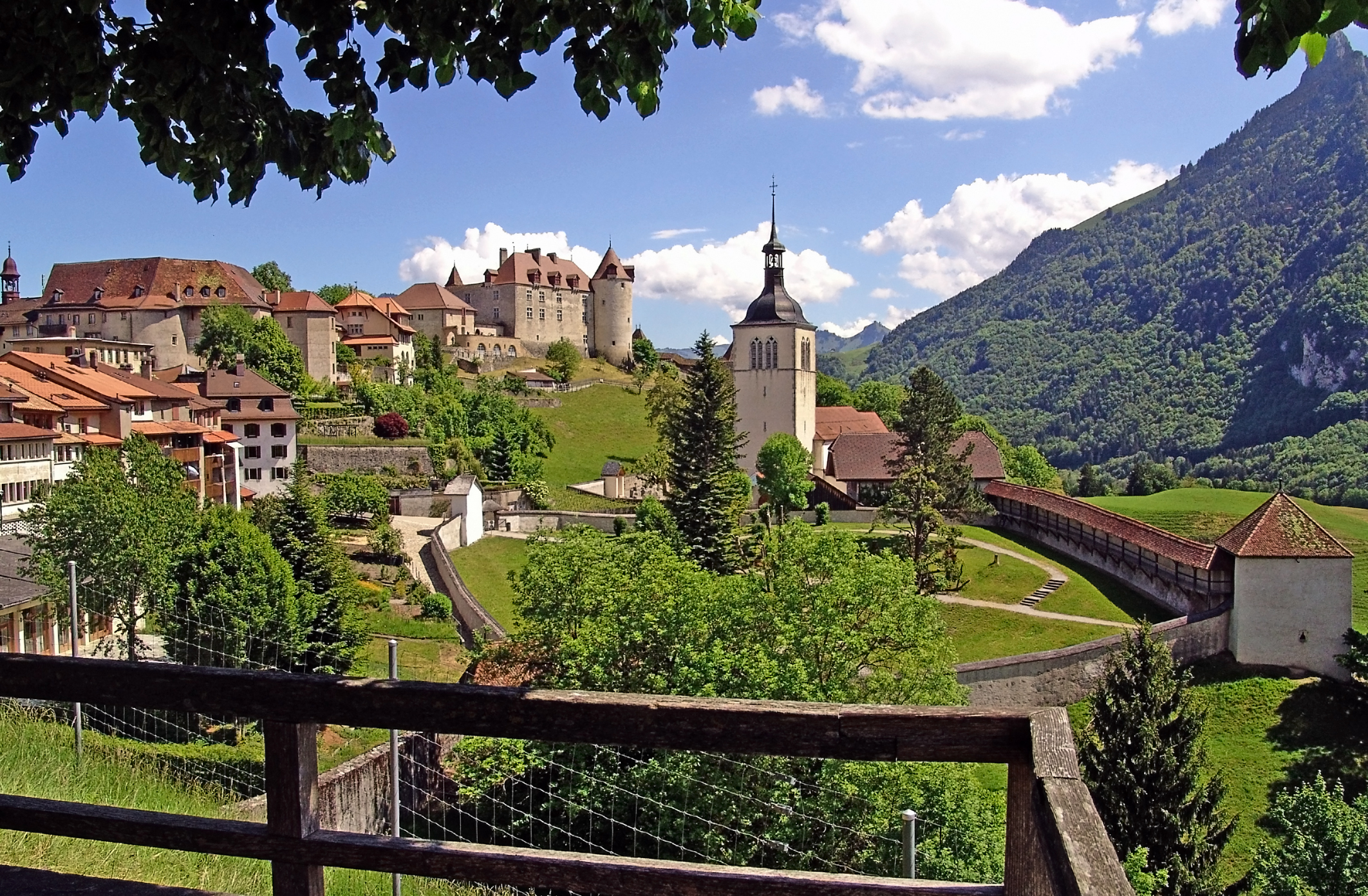 Gruyères FR, die beiden Schlösser, Saint Germain und das Grafenschloss sowie die Kirche Saint-Théodule